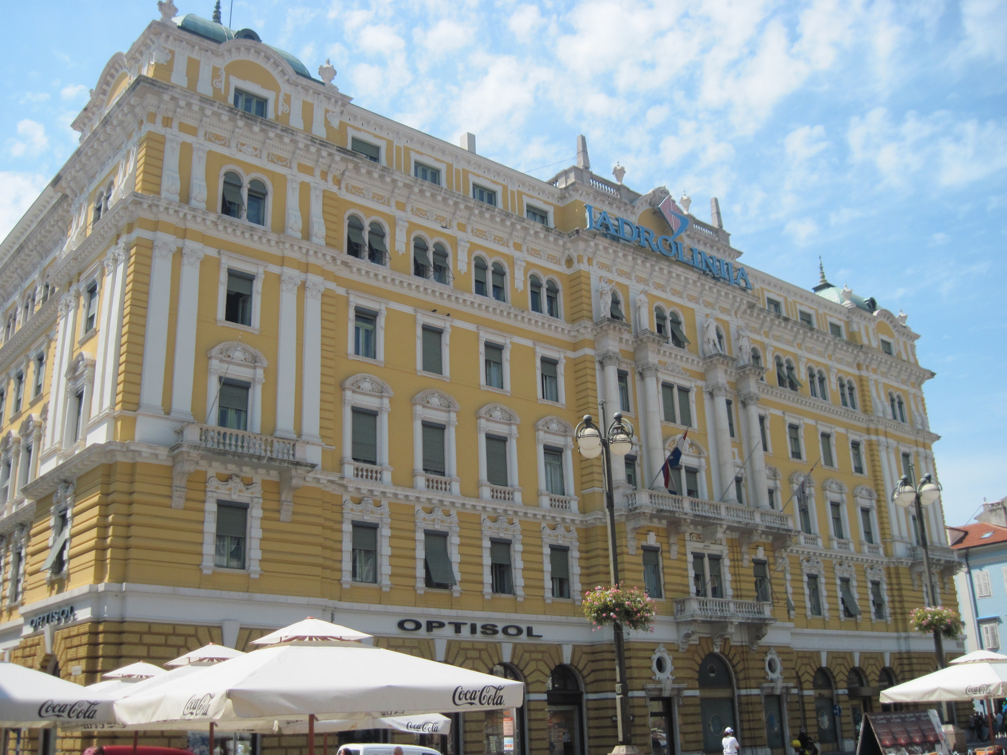 Rijeka